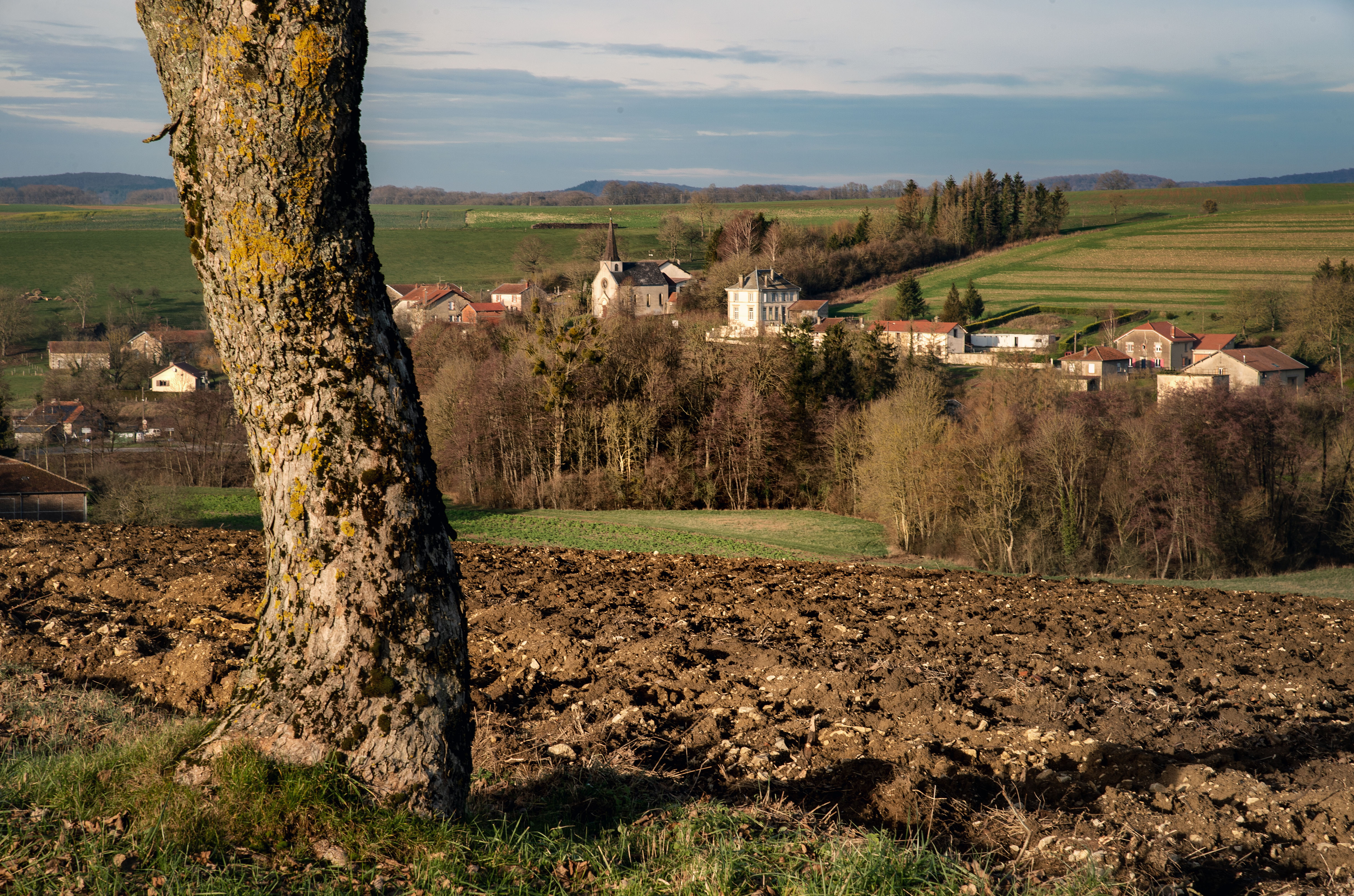 Charpentry (Meuse), zicht op het dorp.